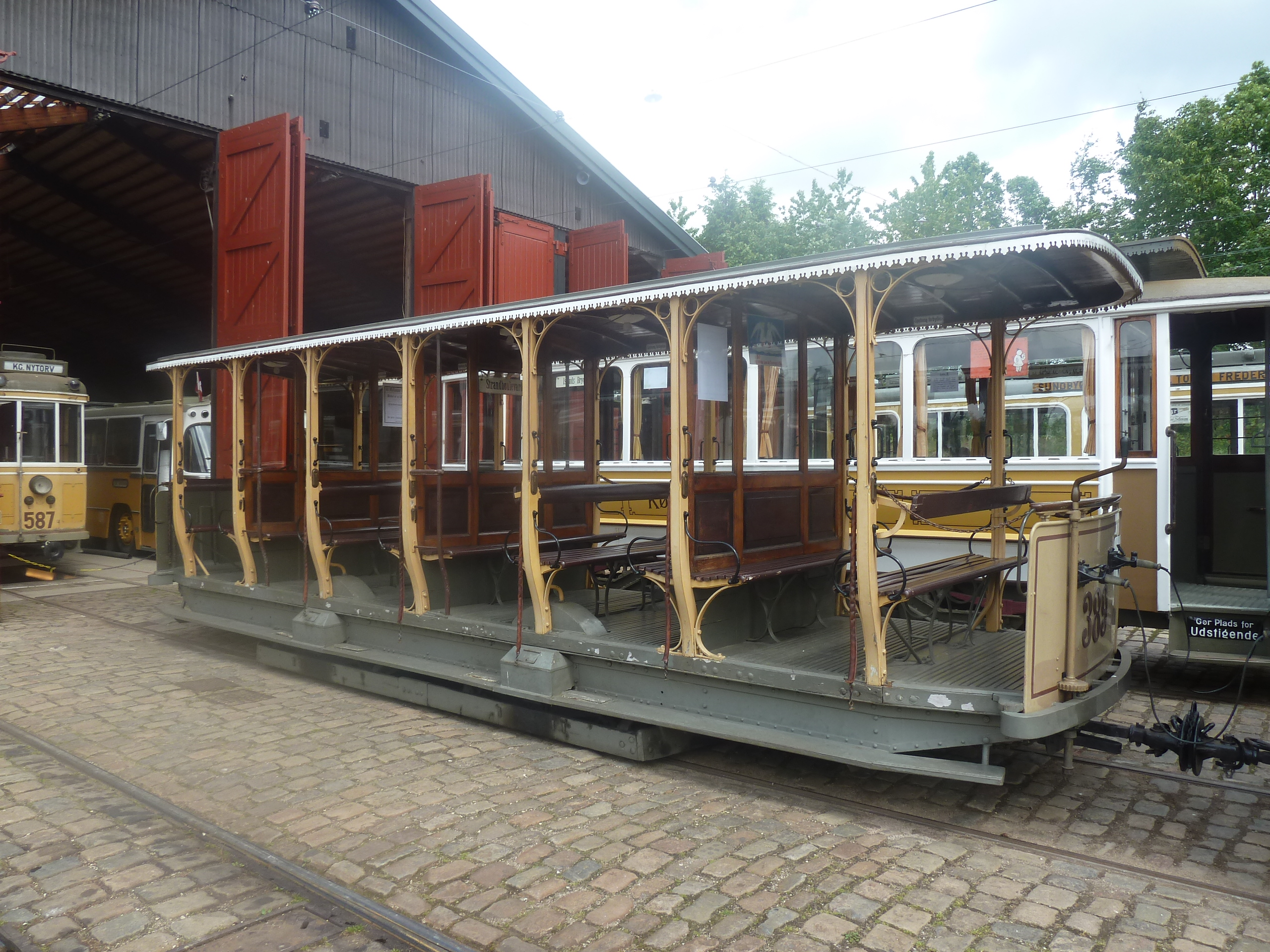 Old summer tram from Copenhagen, KS 389, Sporvejsmuseet Skjoldenæsholm in Denmark.